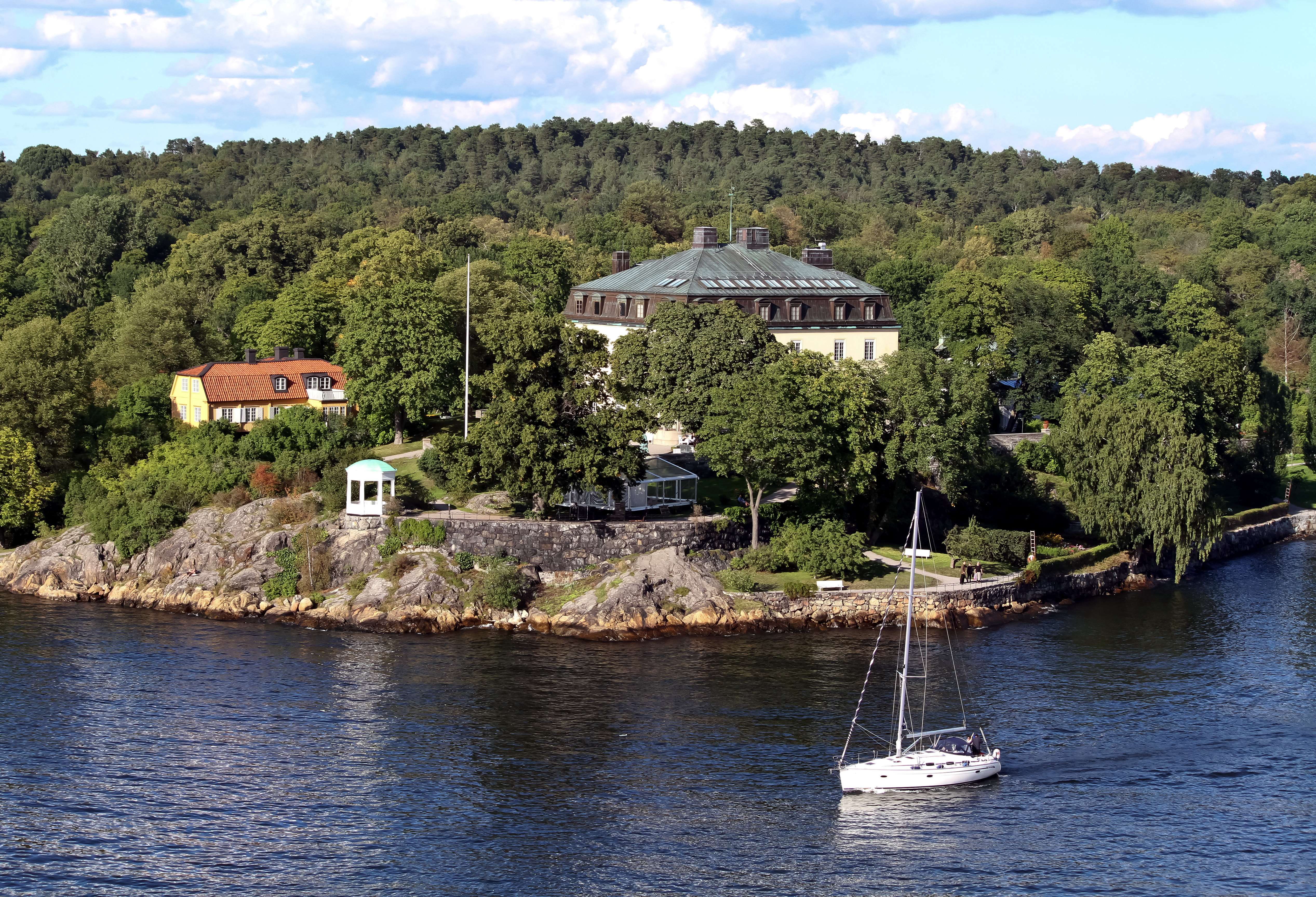 Stockholm: Waldemarsudde